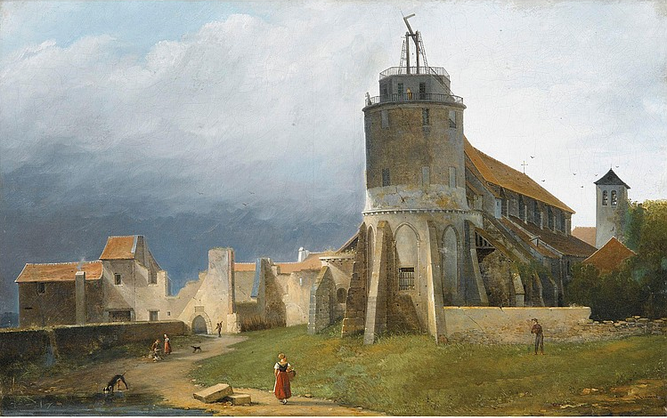 Jacques-Auguste Regnier, Vue de l'église Saint Pierre de Montmartre et du télégraphe optique de Chappe, HST, vers 1820. Collection particulière. Regnier évoqua dans sa peinture une vision romantique du vieux Paris. Dans cette toile il représente le télégraphe optique de Chappe, juché sur le clocher de Saint Pierre de Montmartre, installé à la fin du 18e siècle pour equiper la ligne qui partait en direction du nord de l'Europe.